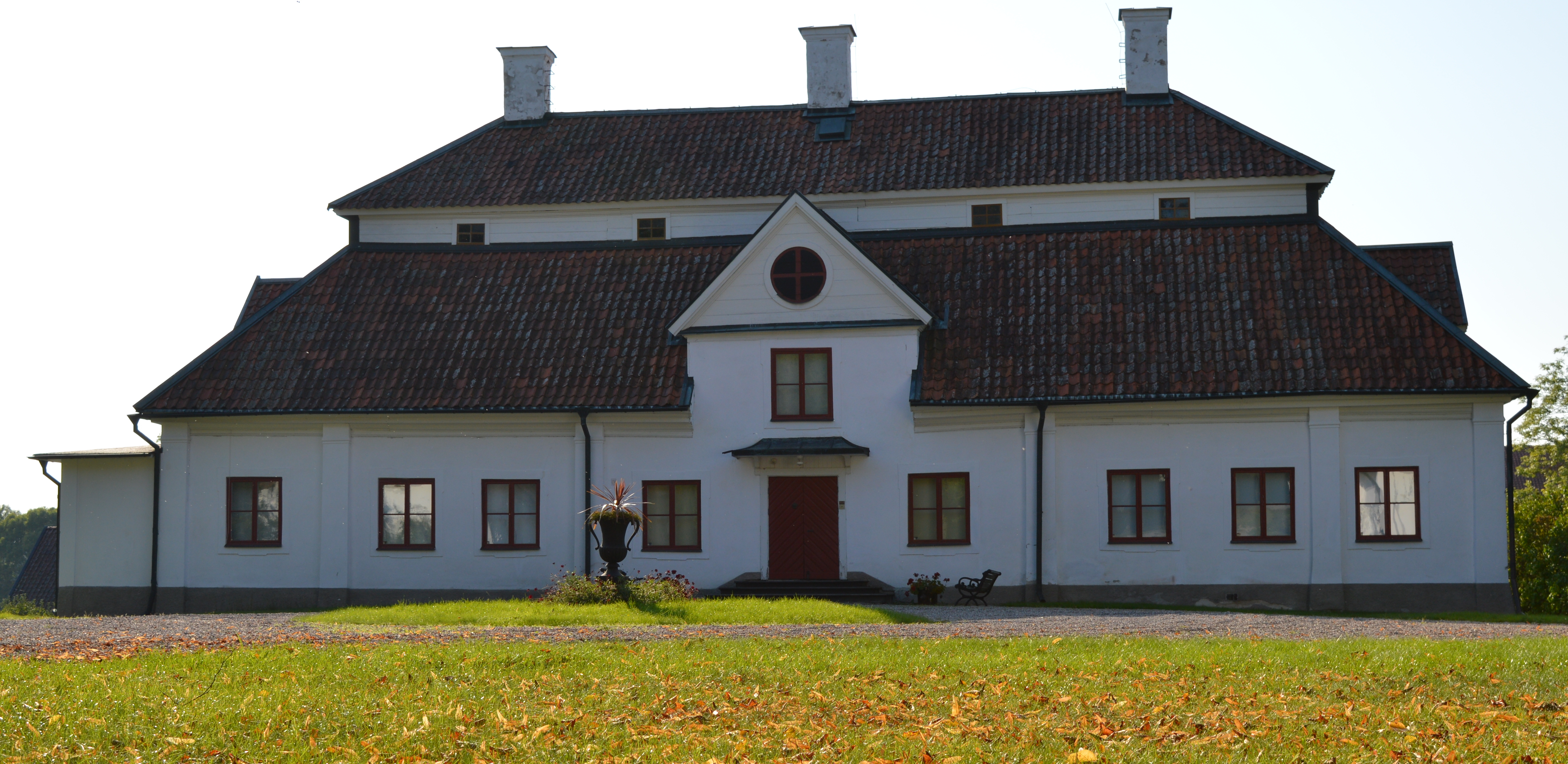 Lagerbergs säteri, Eskilstuna stadsmuseum. Eskilstuna, Eskilstuna